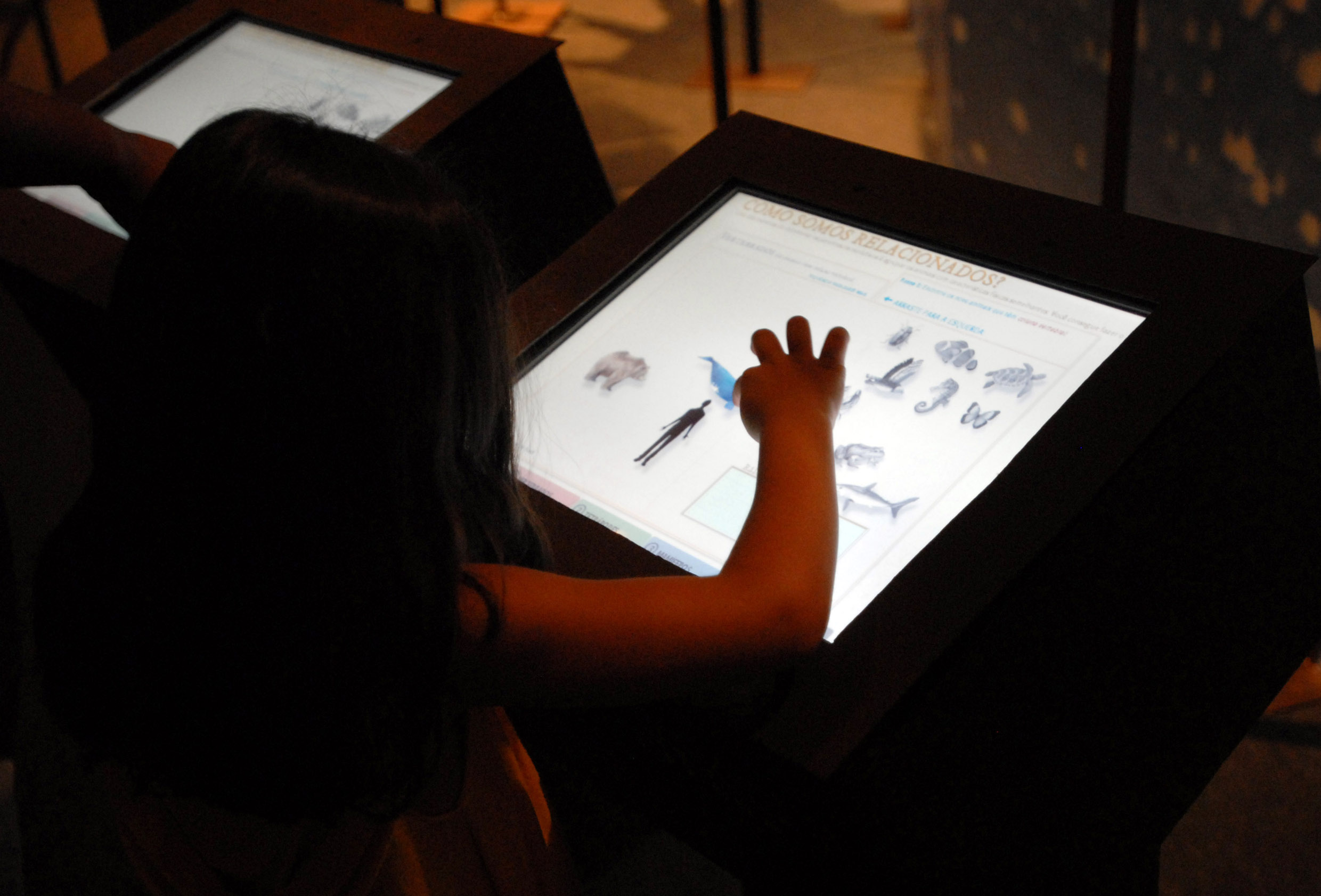 Exposição que marca os 200 anos do nascimento do naturalista Charles Darwin, na Esplanada dos Ministérios, em Brasília